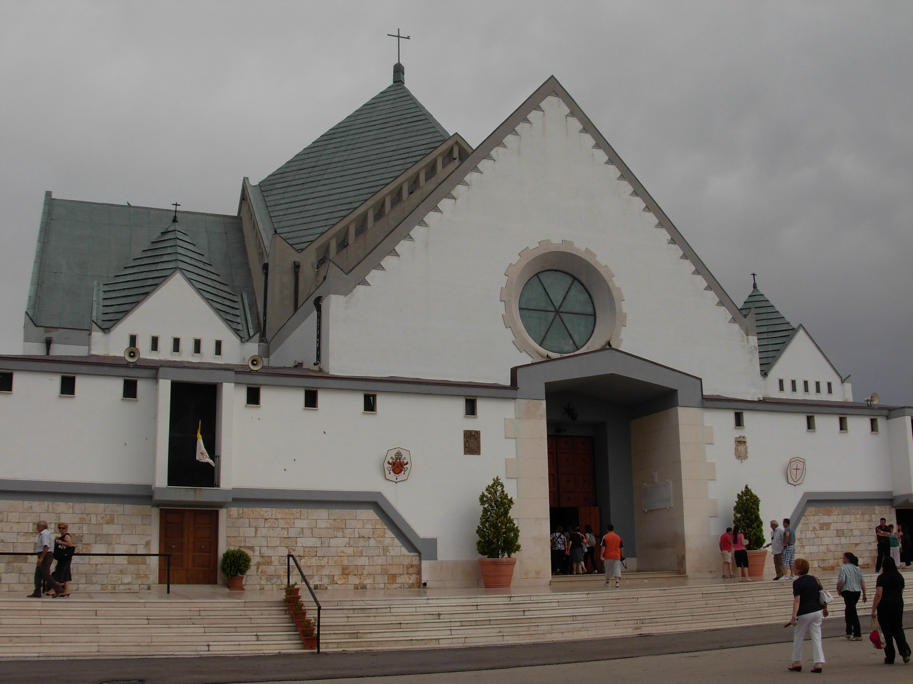 Santuario dell'Incoronata